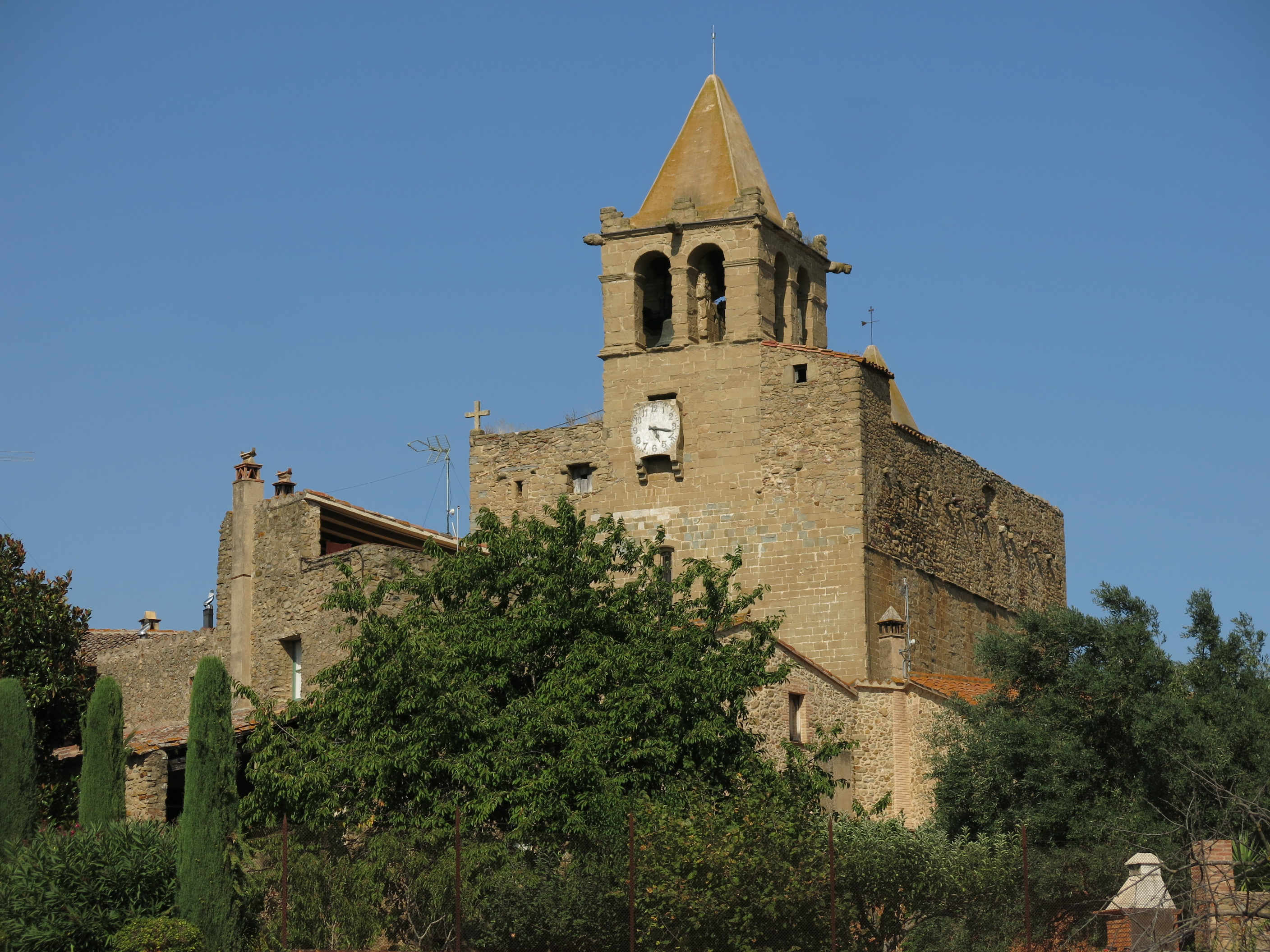 Església de Sant Esteve (Madremanya)